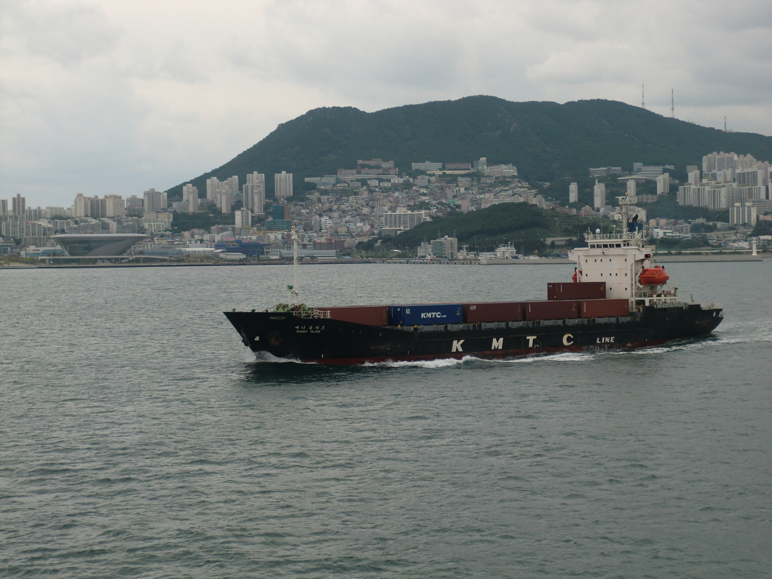 써니 올리브호